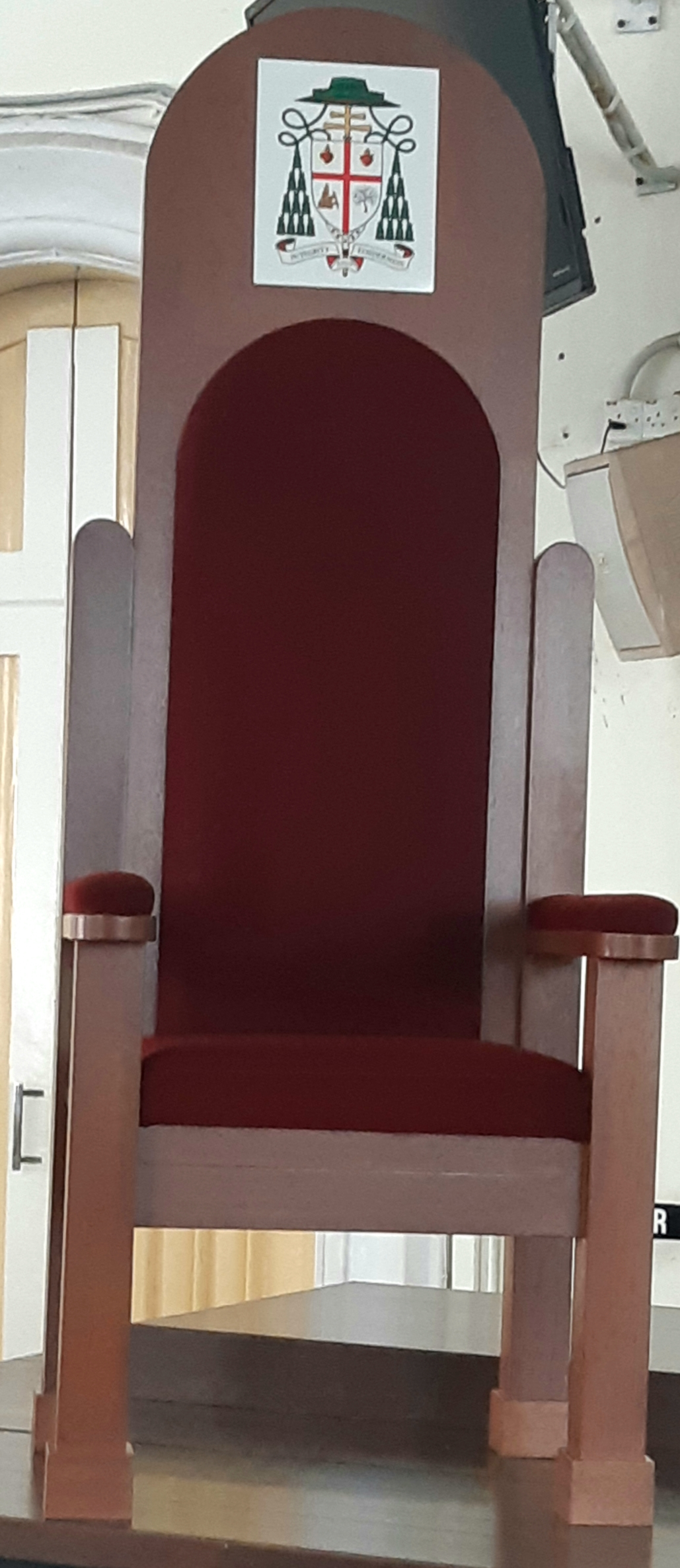 Katedral Santo Yohanes Penginjil Kuala Lumpur